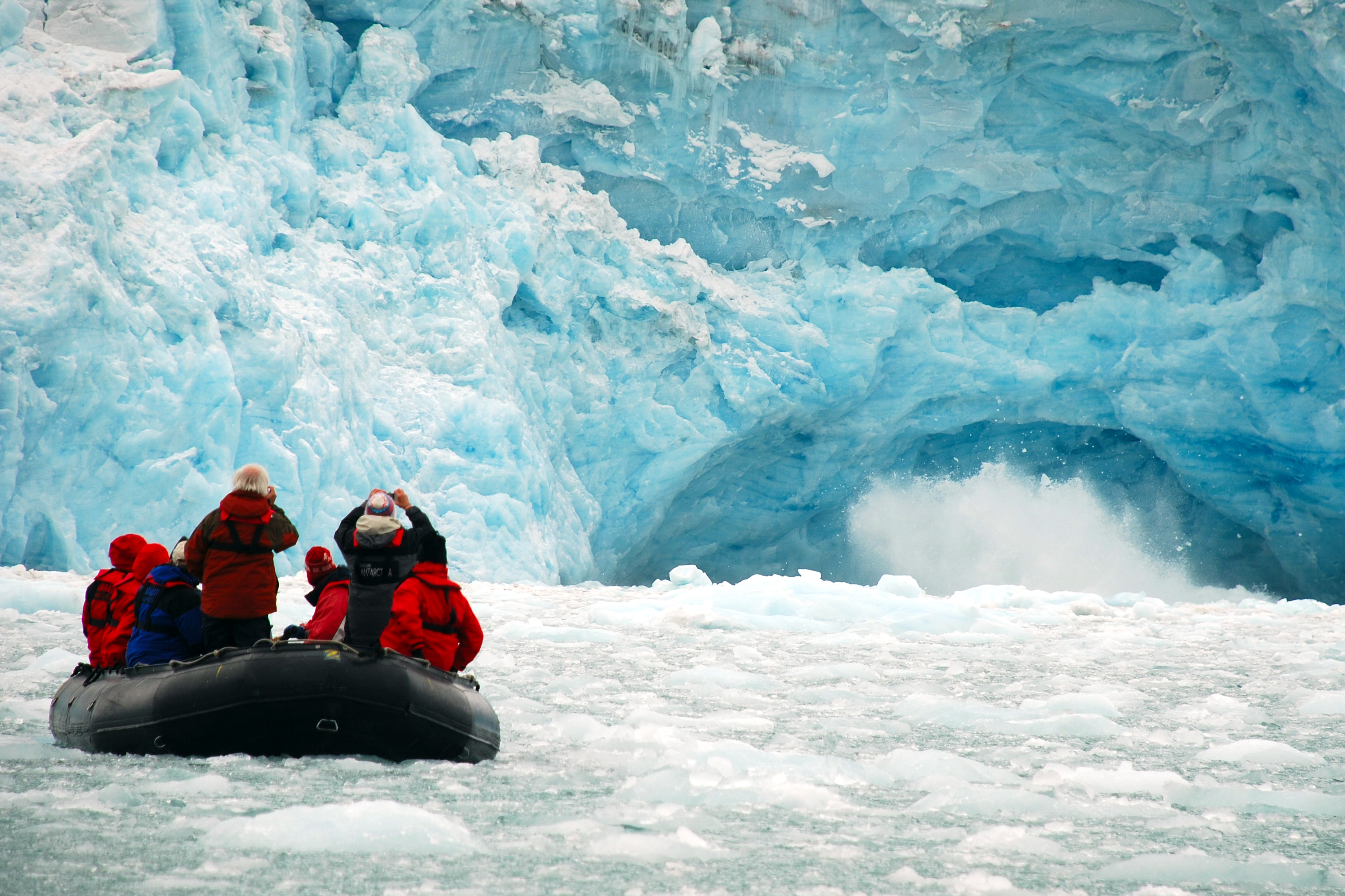 生态旅游，用于旅行话题